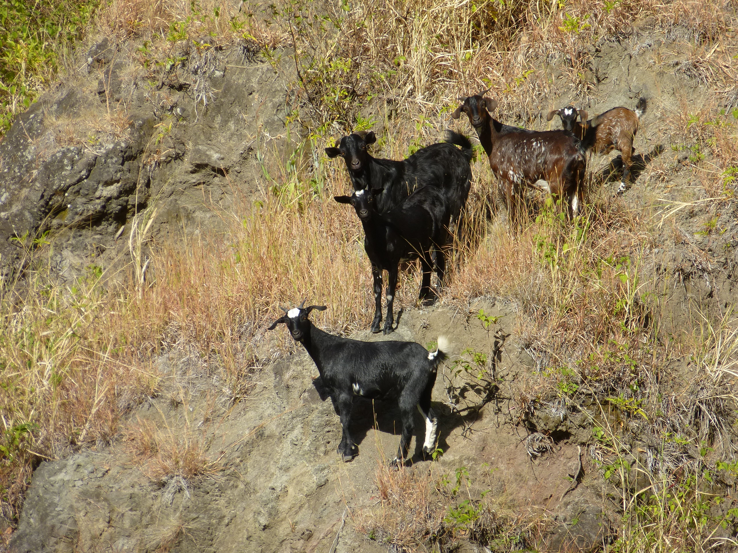 Cabris sauvages dans le cirque de Mafate (secteur de Grand Place)